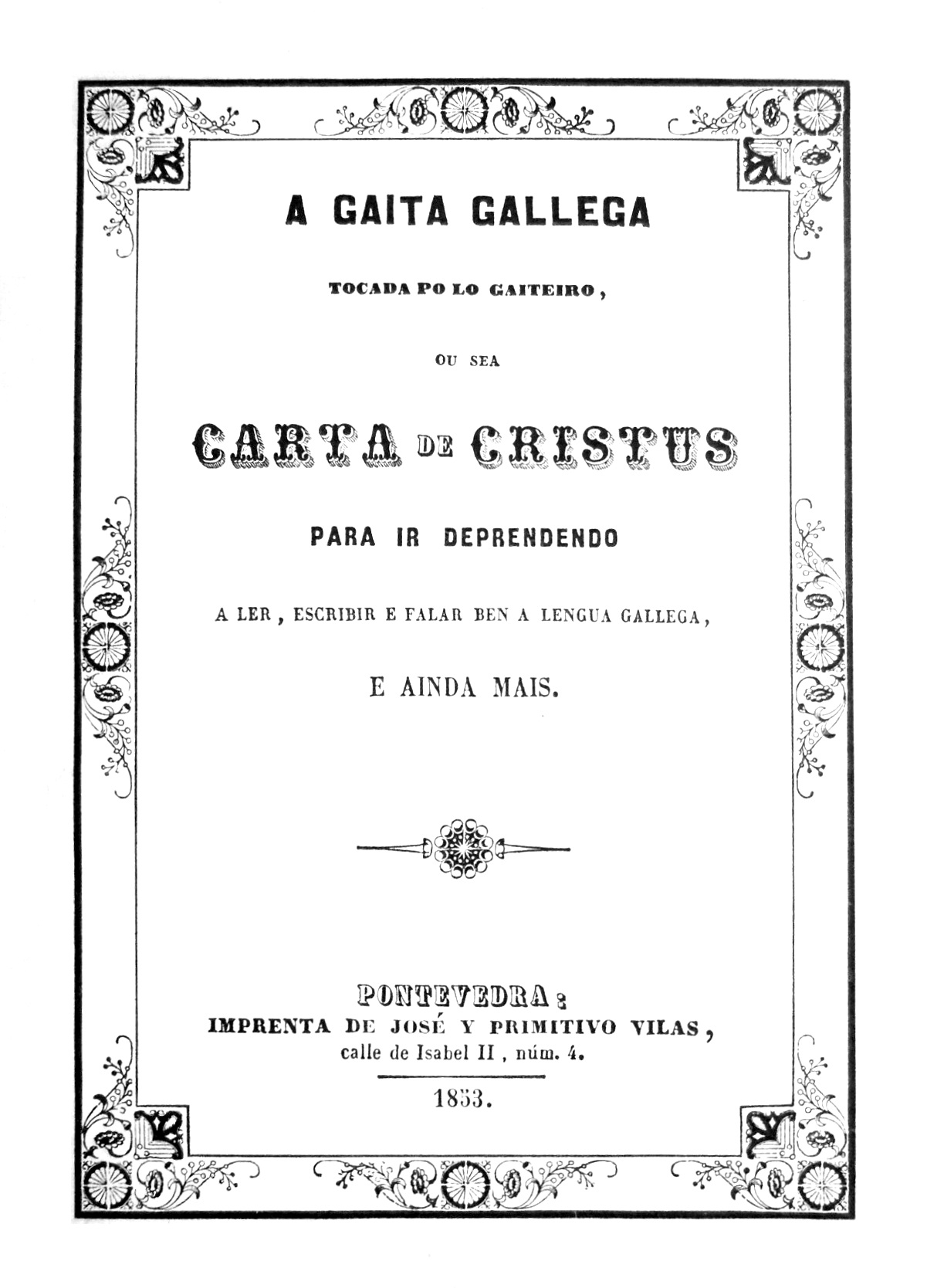 Portada facsímile da primeira edición d' A gaita gallega (1853), de Xoán Manuel Pintos, co seguinte texto: A GAITA GALLEGATOCADA POLO GAITEIRO,OU SEACARTA DE CRISTUSPARA IR DEPRENDENDOA LER, ESCRIBIR E FALAR BEN A LENGUA GALLEGA,E AINDA MAIS.PONTEVEDRA:IMPRENTA DE JOSÉ Y PRIMITIVO VILAS,calle de Isabel II, núm. 4.1853